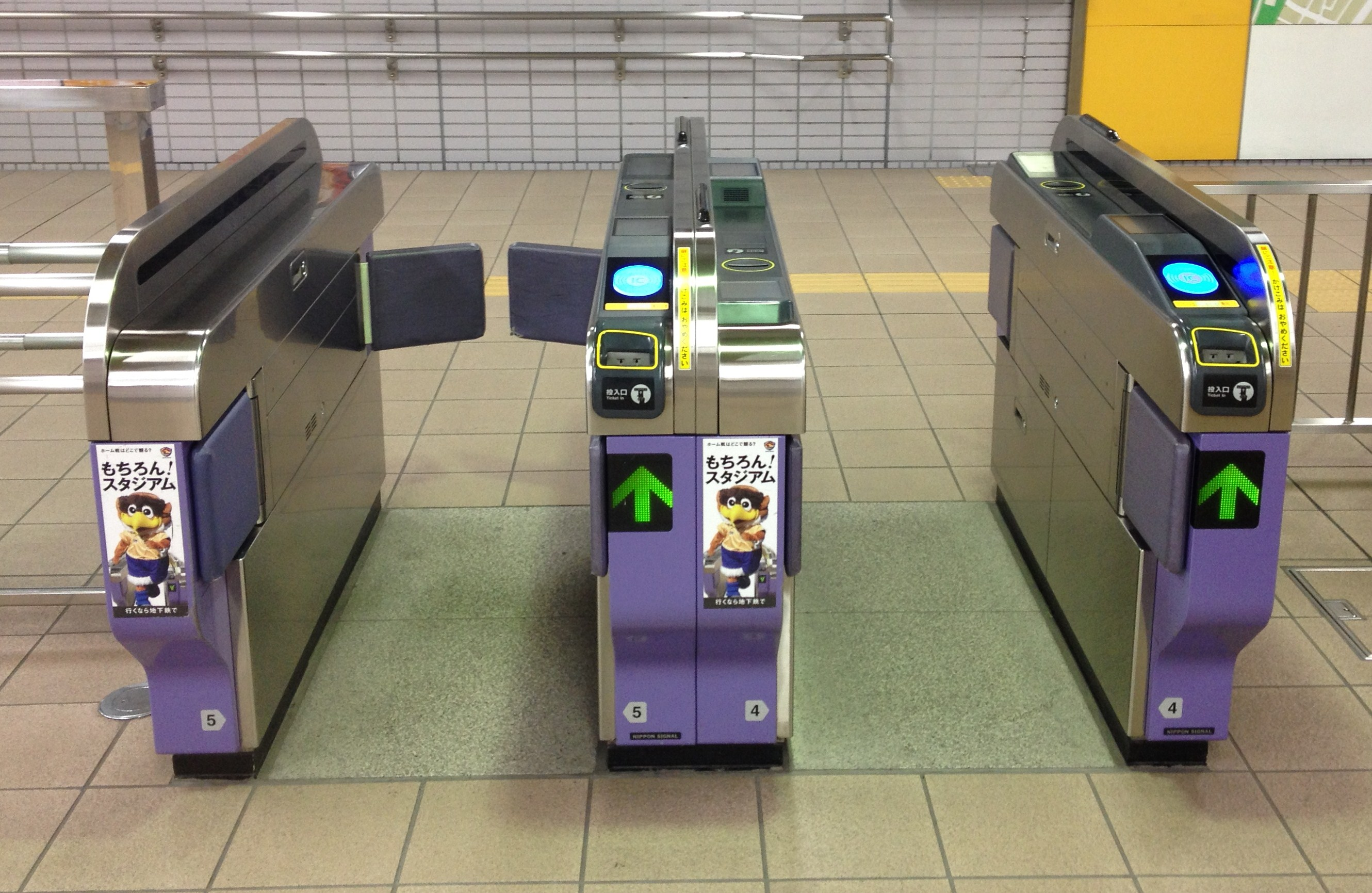 icscaに対応した自動改札機（泉中央駅 北改札口）